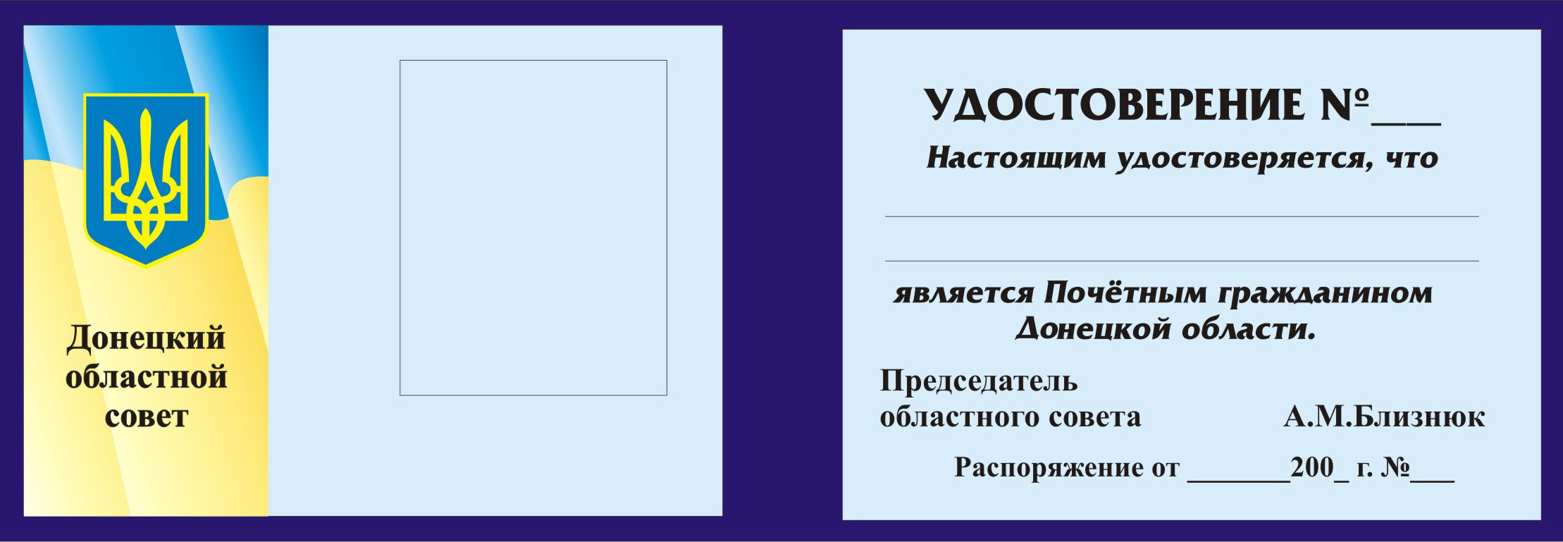 Почётная грамота Донецкого областного совета